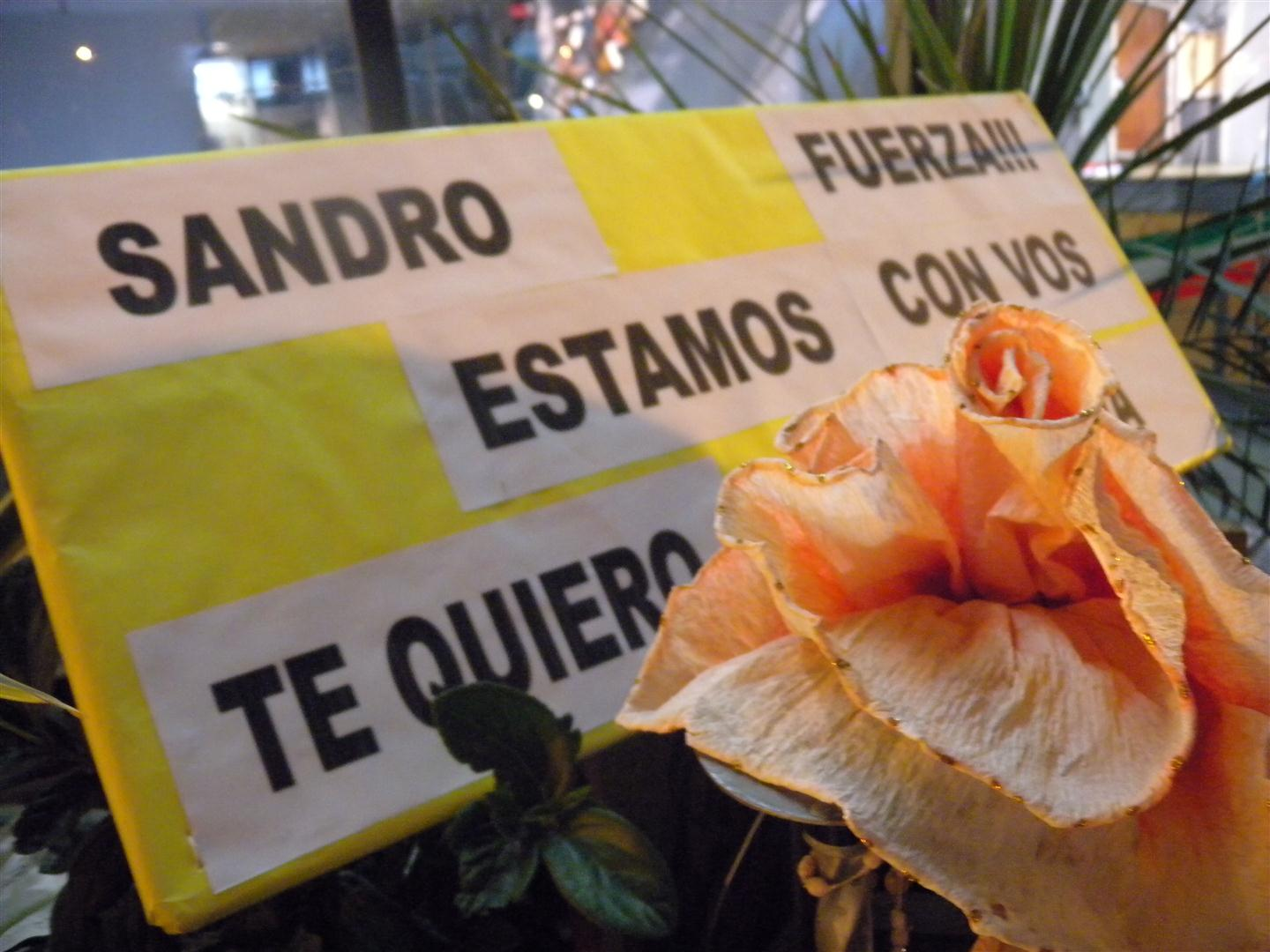 Letrero en el Hospital italiano en la muerte de Sandro